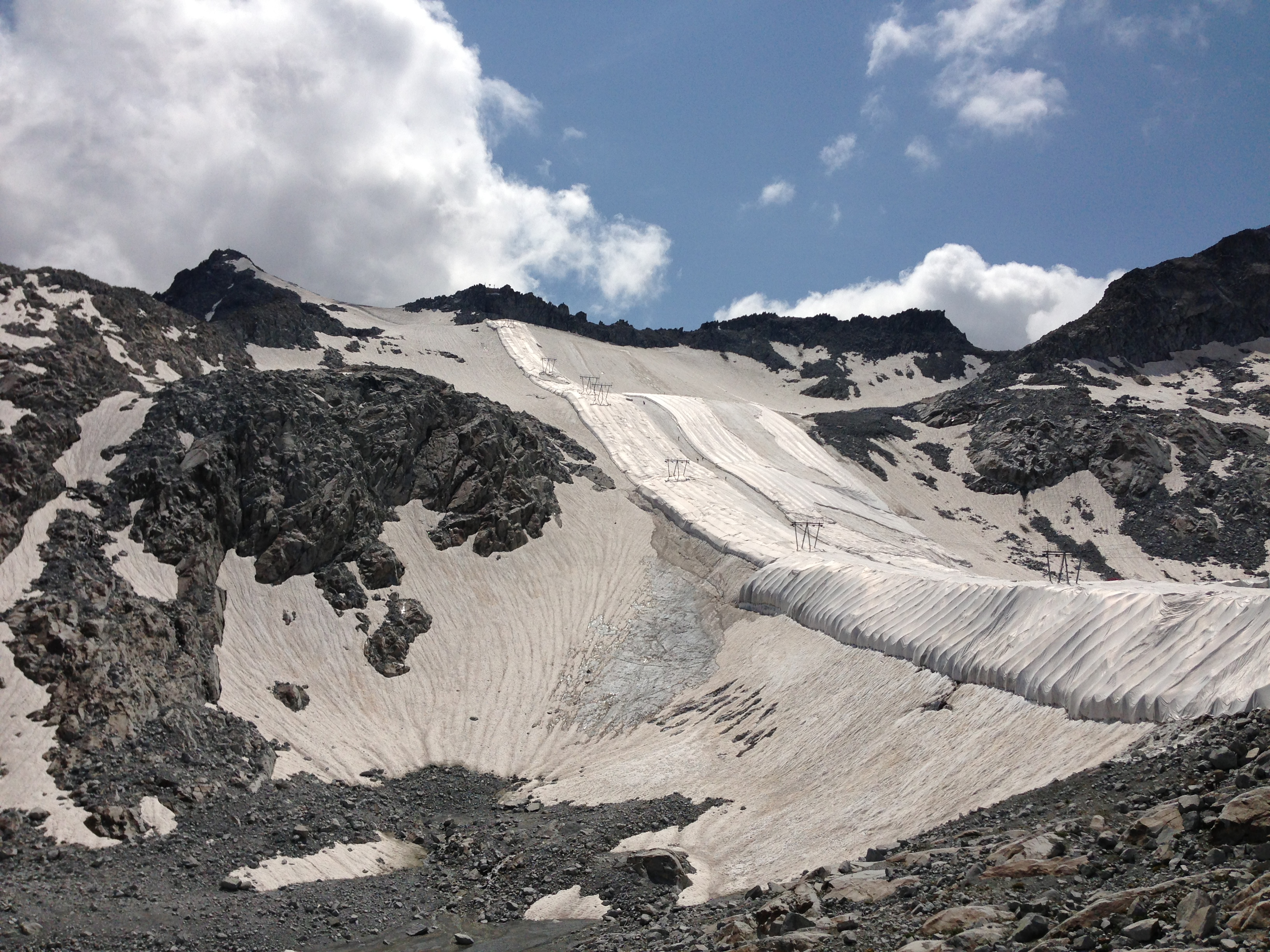 Il Presena